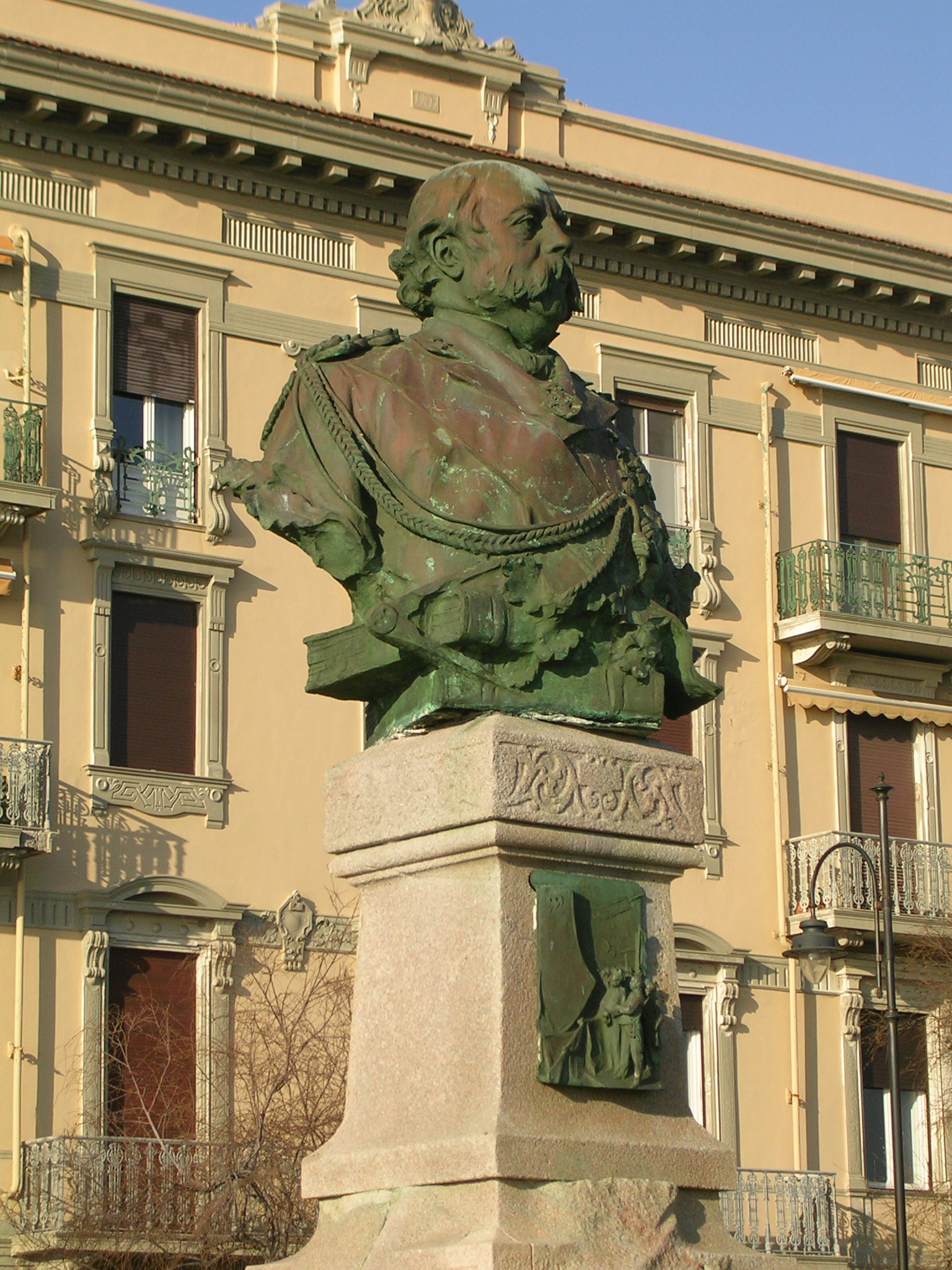 Livorno: il Monumento a Benedetto Brim, posto sul lungomare cittadino davanti all'Accademia Navale. Sullo sfondo Palazzo Saccardi, d'inizio Novecento, in un vago stile Liberty.